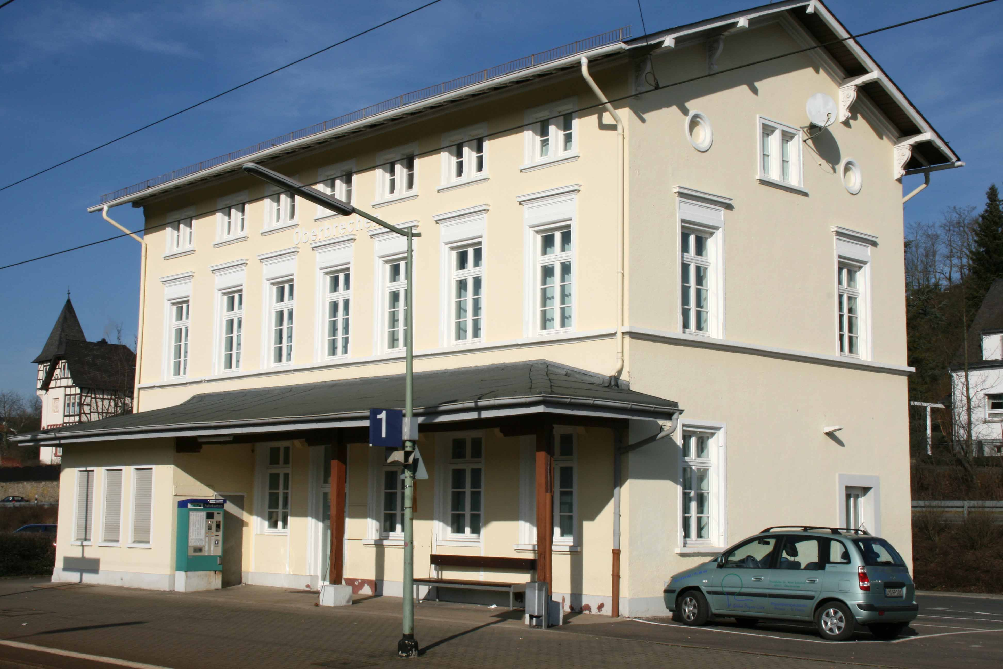 Bahnhof, Brechen-Oberbrechen, Deutschland